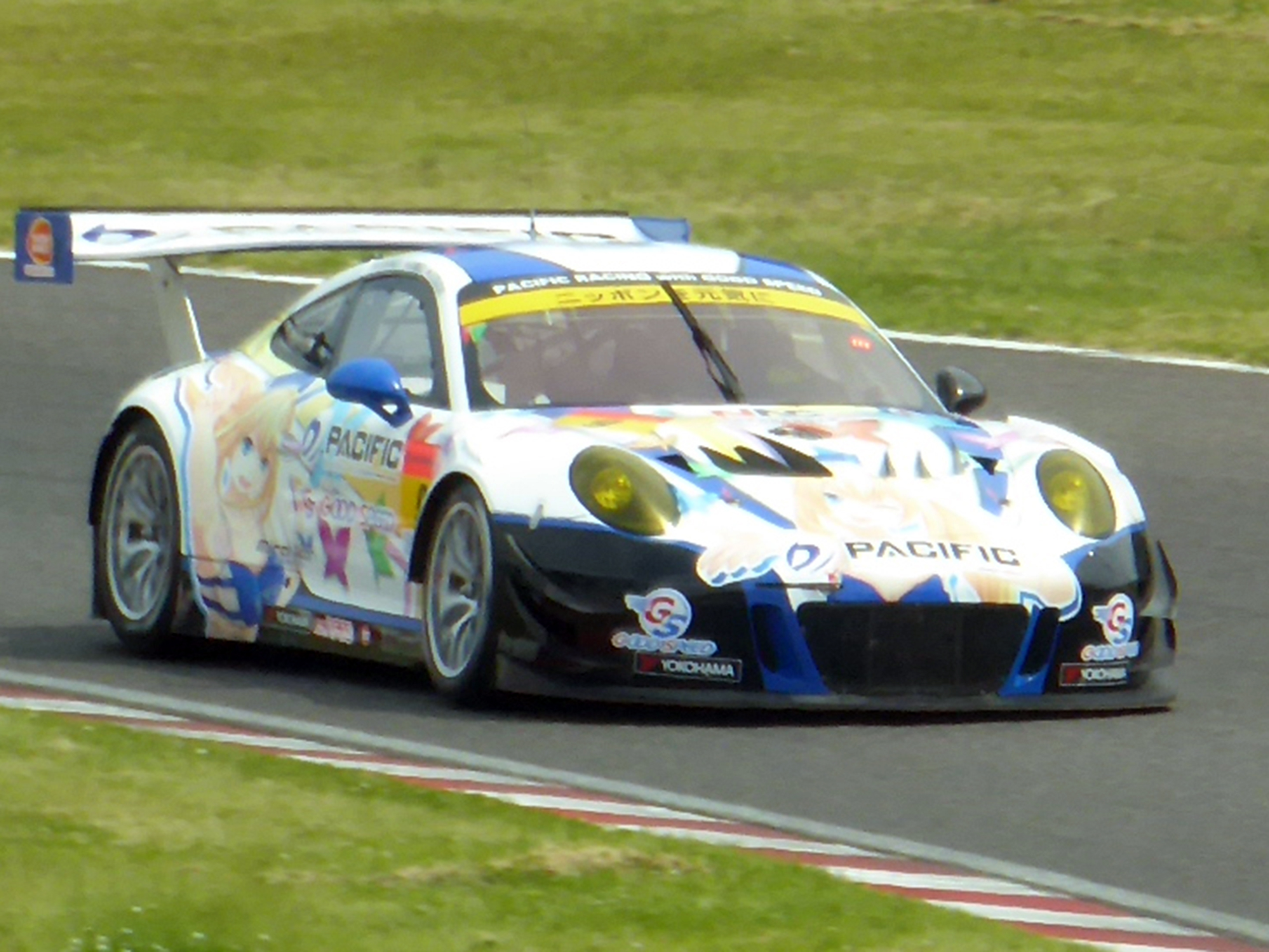 2019年鈴鹿GT300㎞において9号車PACIFIC MIRAI AKARI NAC PORSCHEを撮影。